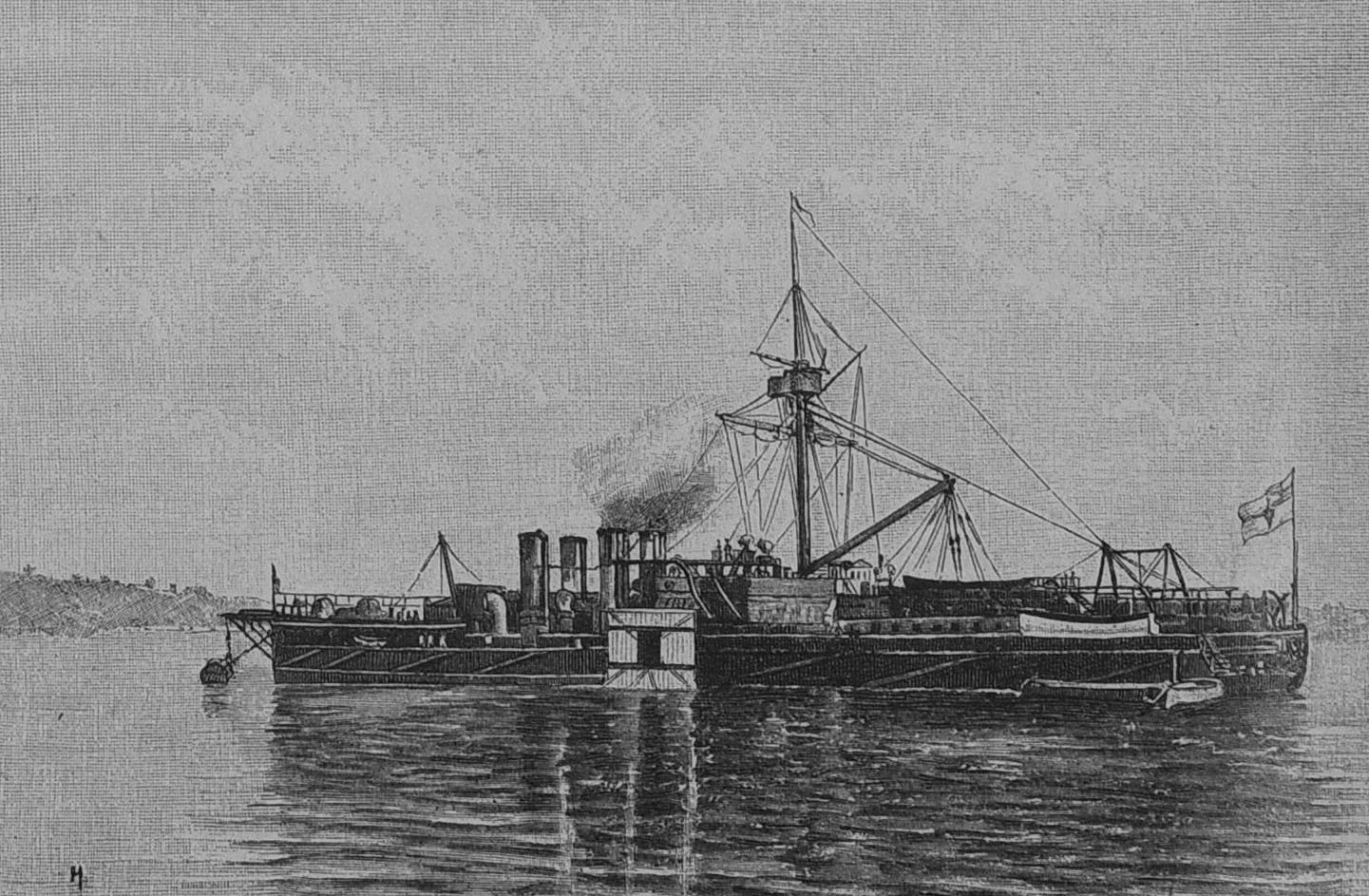 SMS Bayern (Stapellauf 1878) auf einer Zeichnung.